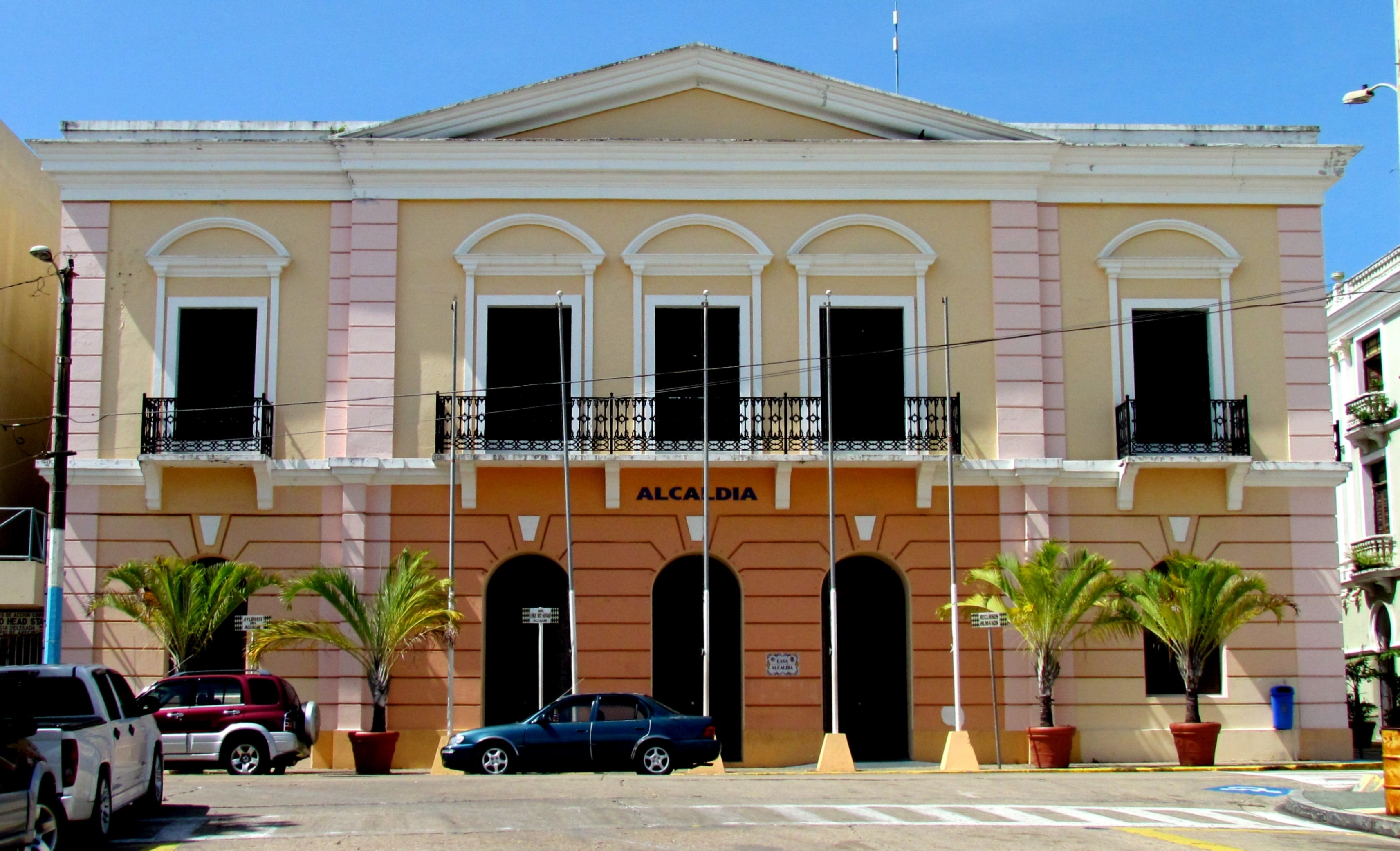 Casa Alcaldia, Arecibo, Puerto Rico